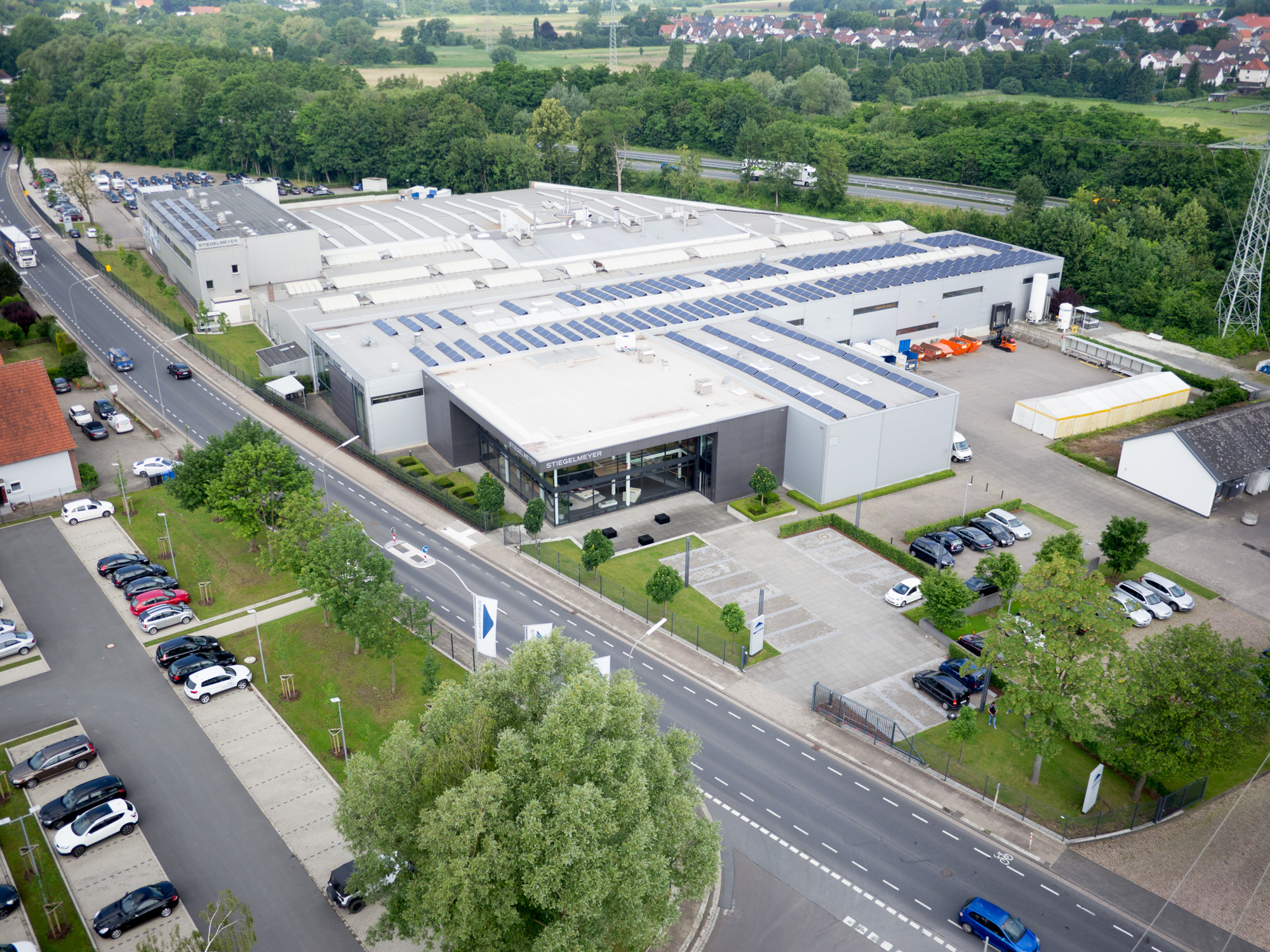 Blick über das Stiegelmeyer-Firmengelände in Herford.